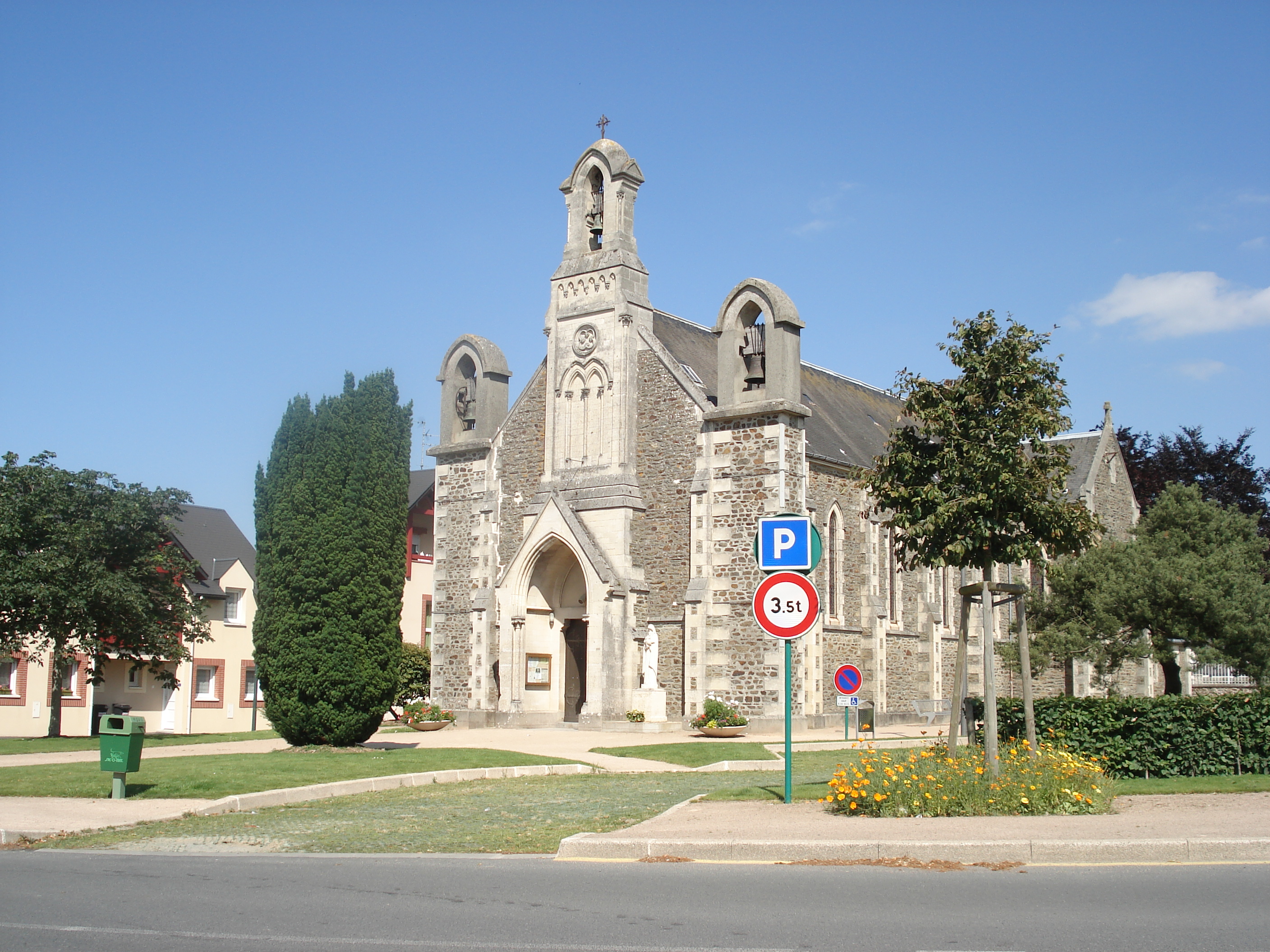 Chapelle de la Mine du Molay Littry